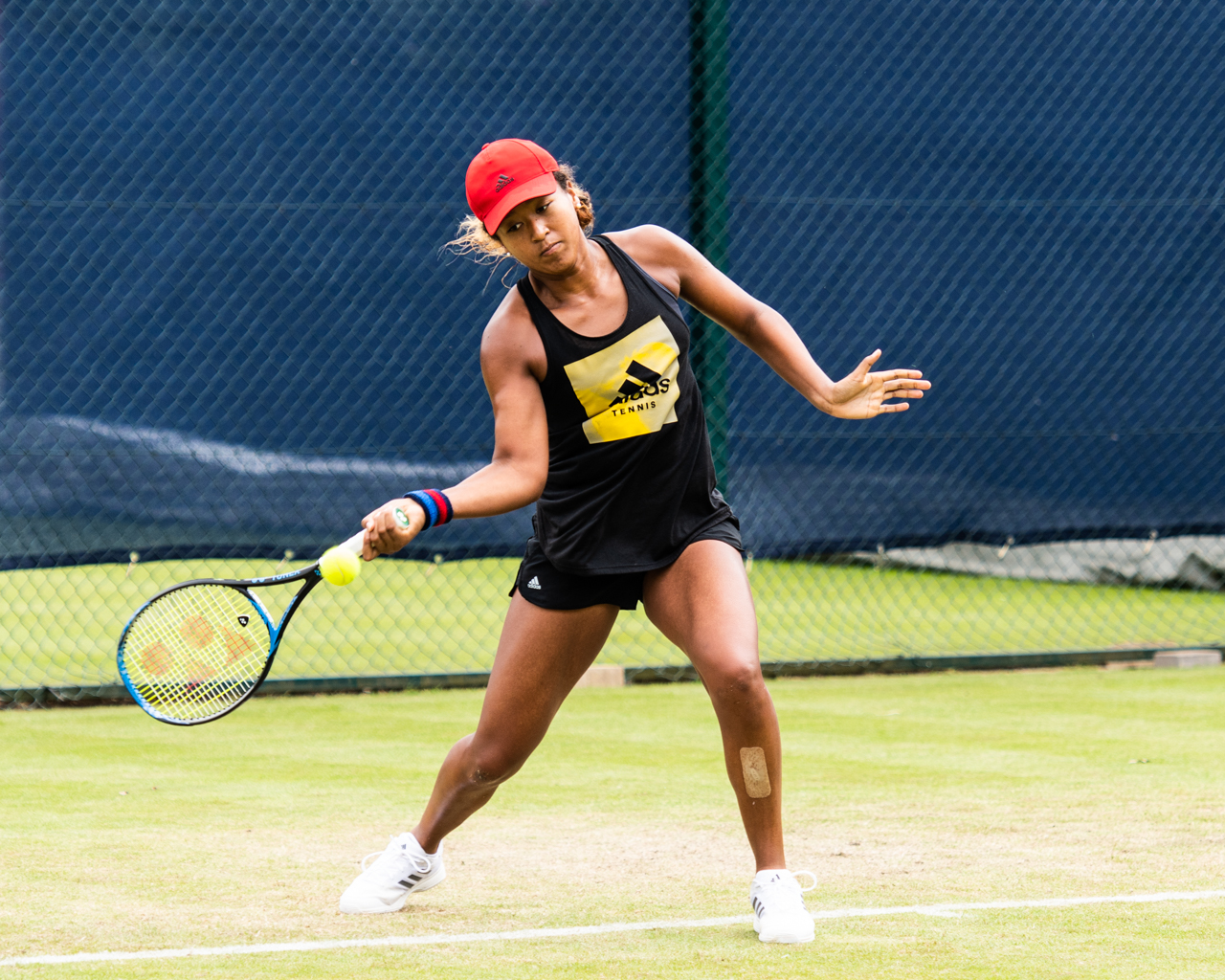 Naomi Osaka